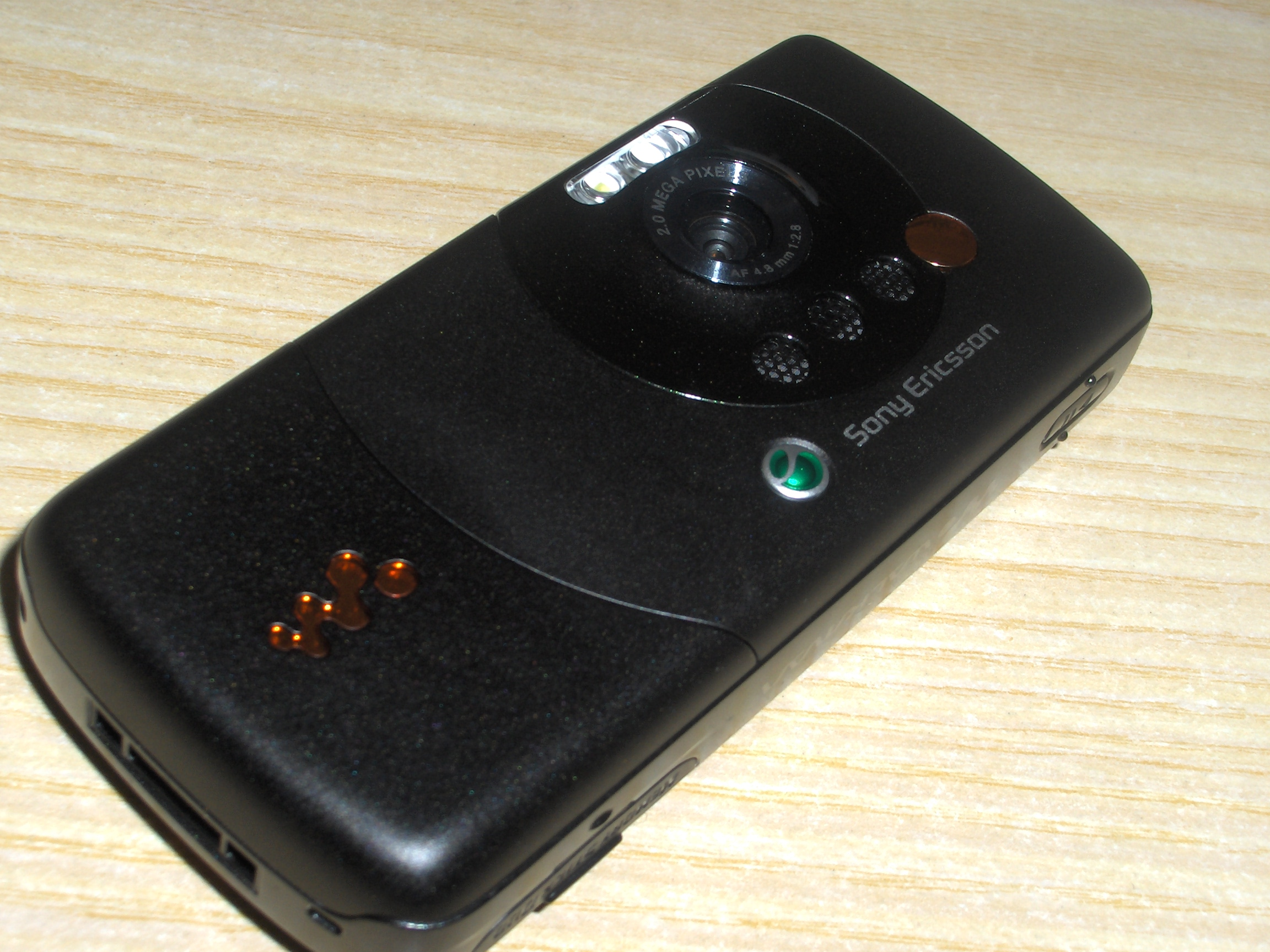 Sony Ericsson W810i back side